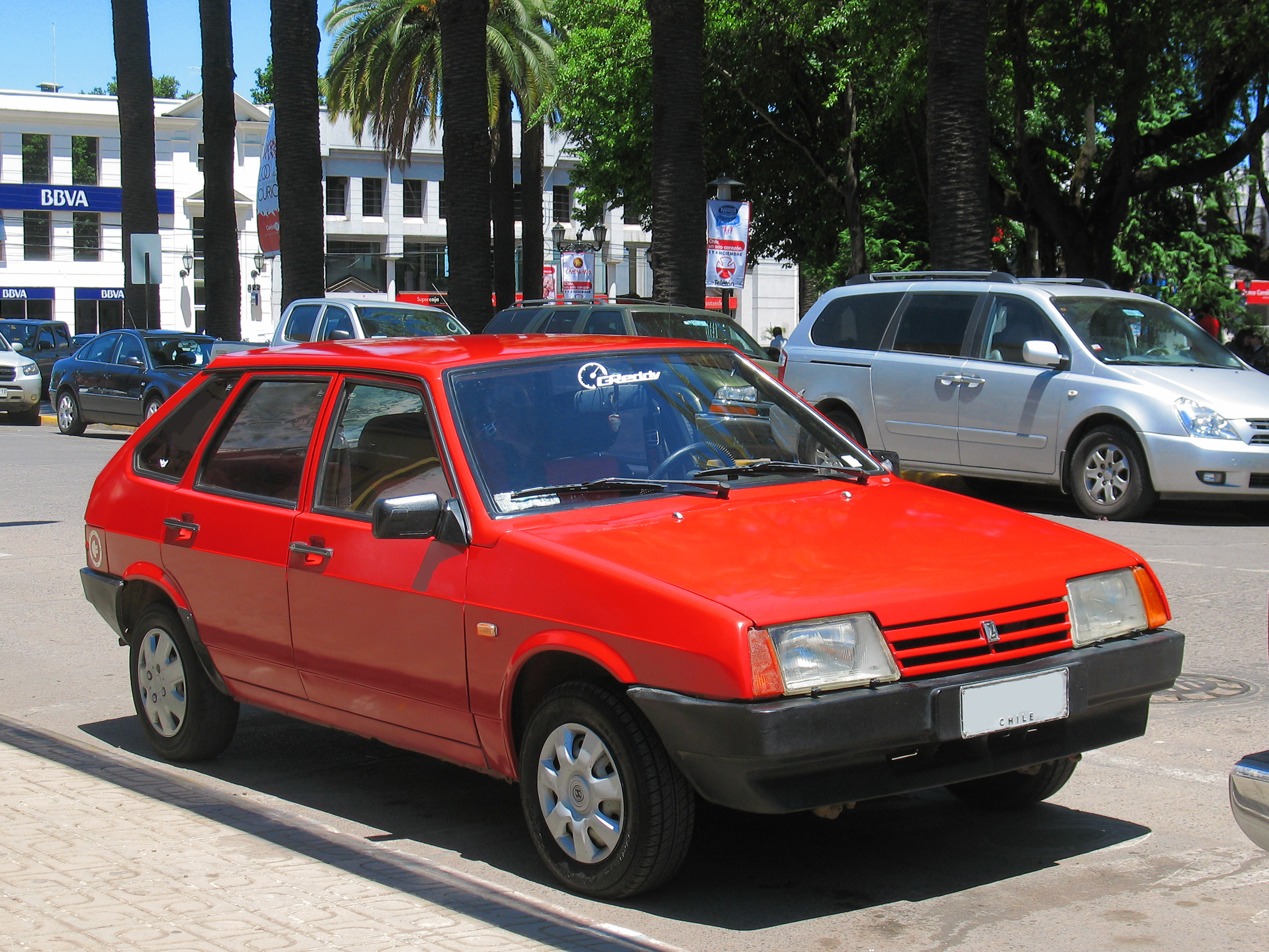 Lada Samara 1500 S 1995